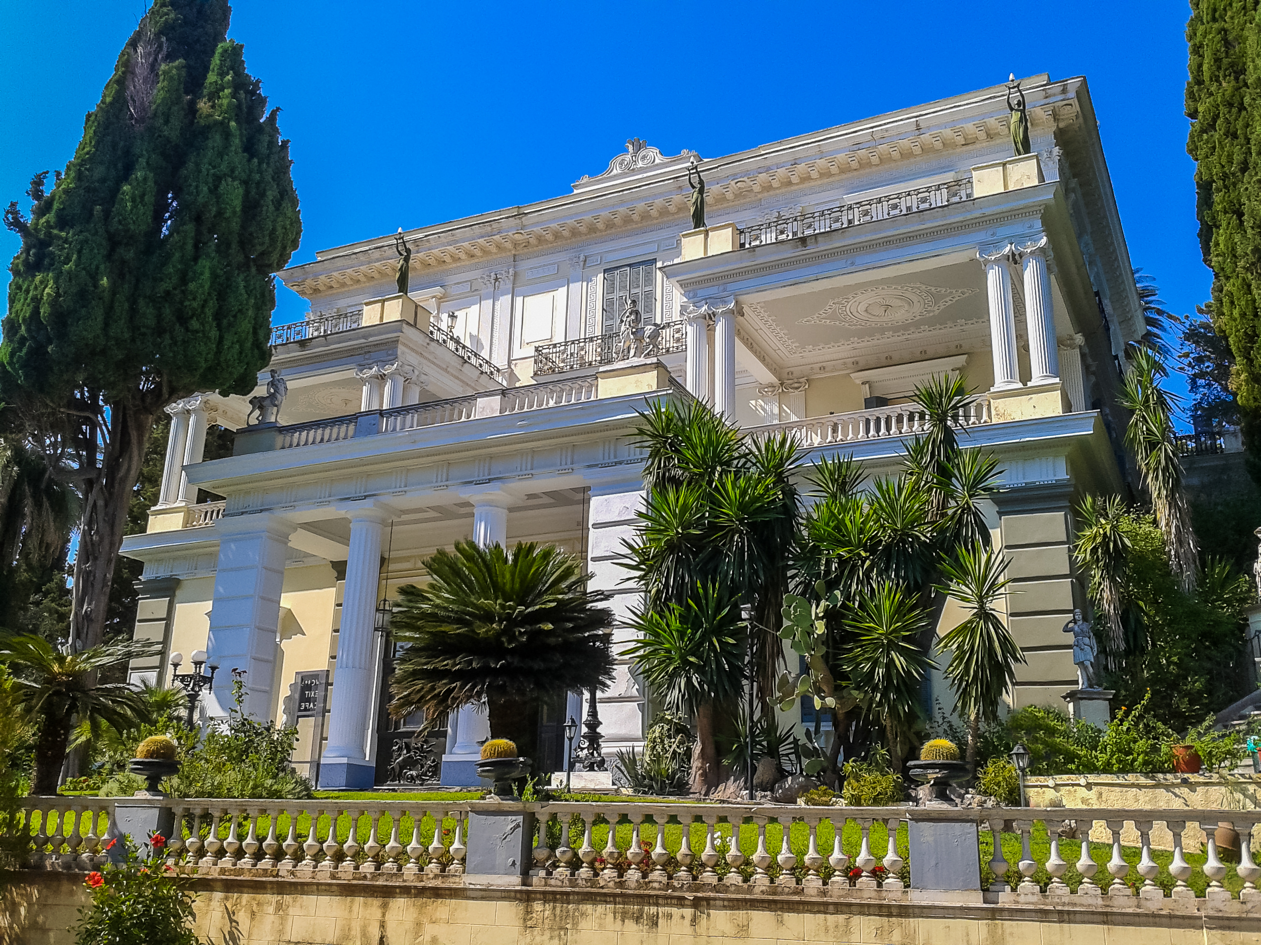 Το Αχίλλειο είναι μία από τις γνωστότερες βασιλικές επαύλεις της Ευρώπης και ίσως το σημαντικότερο αξιοθέατο αρχιτεκτόνημα της Κέρκυραςπου βρίσκεται παρά τον οικισμό Γαστούρι, περίπου 10 χλμ. από την πόλη της Κέρκυρας. Η έπαυλη αυτή σχεδιάστηκε από τους Ιταλούς αρχιτέκτονες Ραφαέλε Καρίττο (Raffaele Caritto) και Αντόνιο Λάνντι (Antonio Landi) με επόπτη τον πρόξενο της Αυστρίας στην Κέρκυρα Αlexander Warssderg στην αρχή, και μετά τον θάνατό του τον βαρώνο Von Bucowitz, σε πομπηινό ρυθμό και χτίστηκε το 1890 με εξ ολοκλήρου δαπάνη της αυτοκράτειρας Ελισάβετ της Αυστρίας, η οποία λόγω της ευαίσθητης υγείας της ζήτησε την οικοδόμησή της. Την έπαυλη την αφιέρωσε στον Αχιλλέα, απ’ όπου και το όνομα της, τον περίβολο της οποίας πλούτισε με αγάλματα από την αρχαία ελληνική μυθολογία. Εξ αυτών τα πιο γνωστά έργα είναι οι "Επτά Μούσες" και ο Αχιλλέας Θνήσκων του Χέρτερ.«Αχίλλειο»